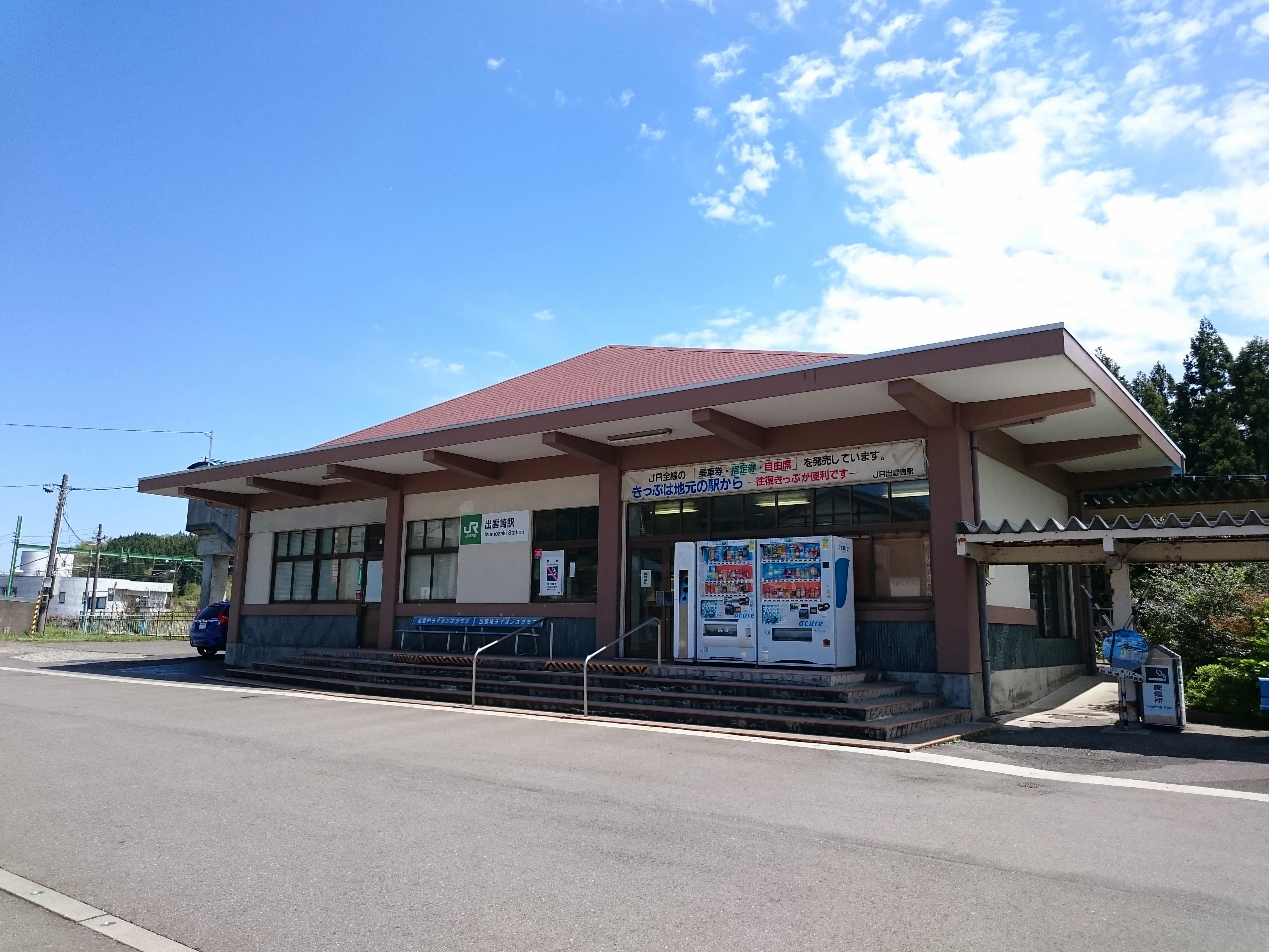 出雲崎駅の駅舎外観